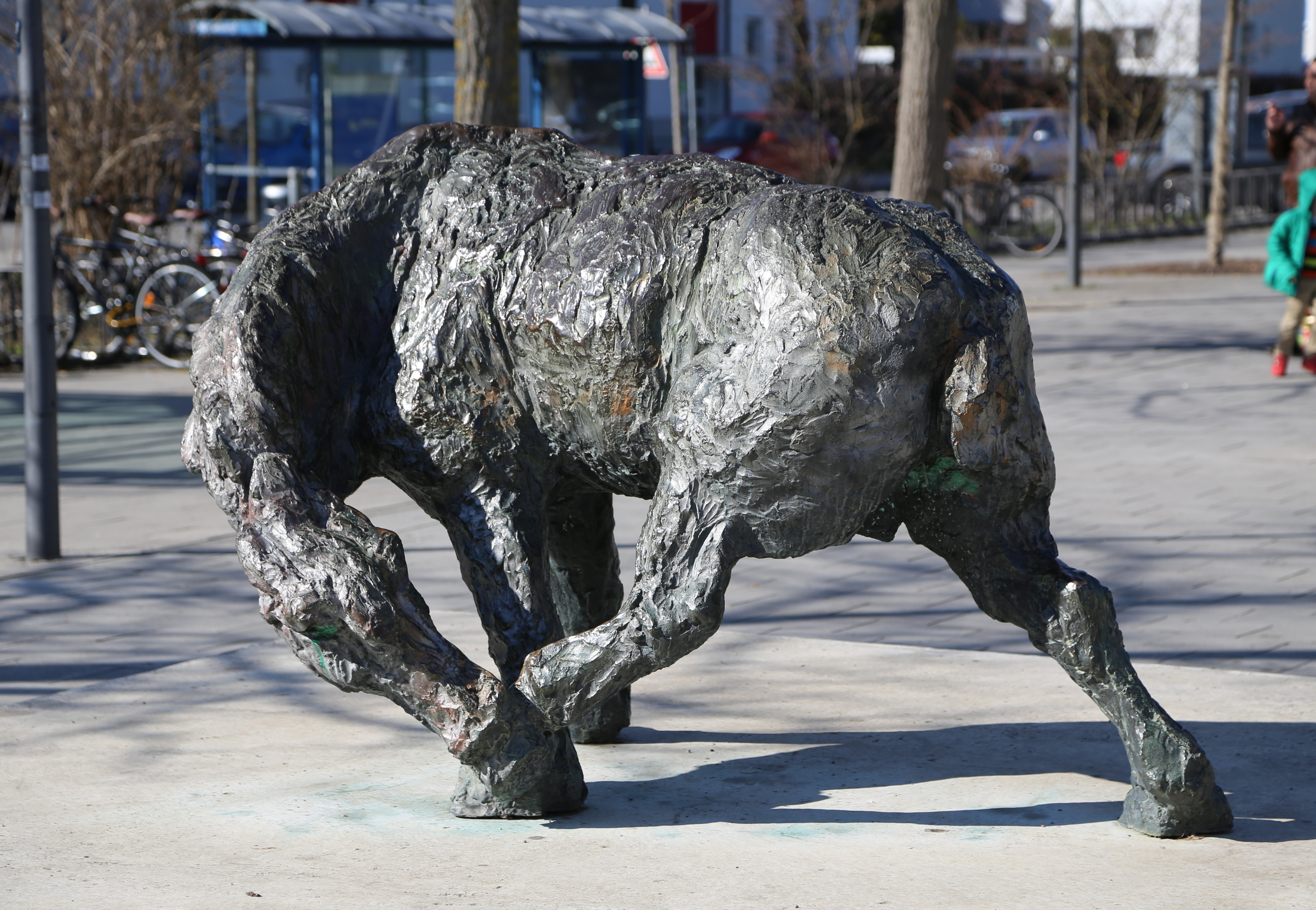 Alexander Fischer: „Pferd, sich beißend“, 1965, (seit 2012 vor dem "Kulturzentrum 2411", München-Hasenbergl)